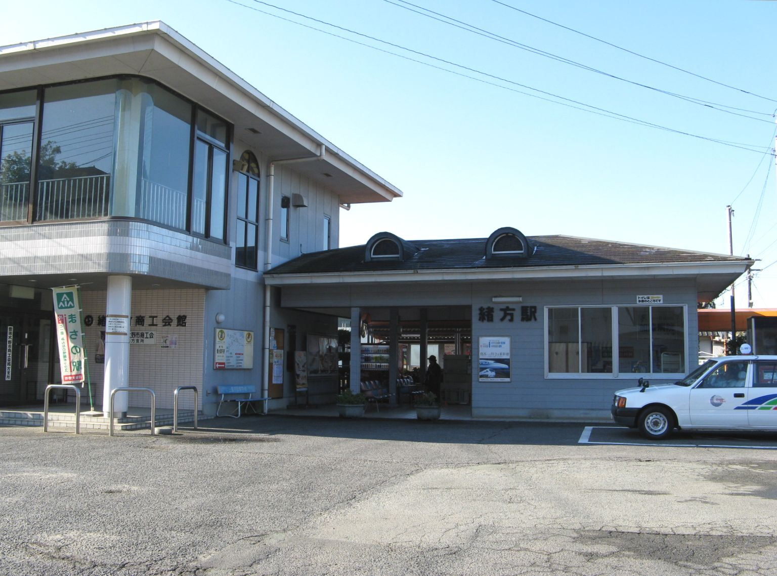 豊肥本線 緒方駅 2008年10月 Bakkai撮影